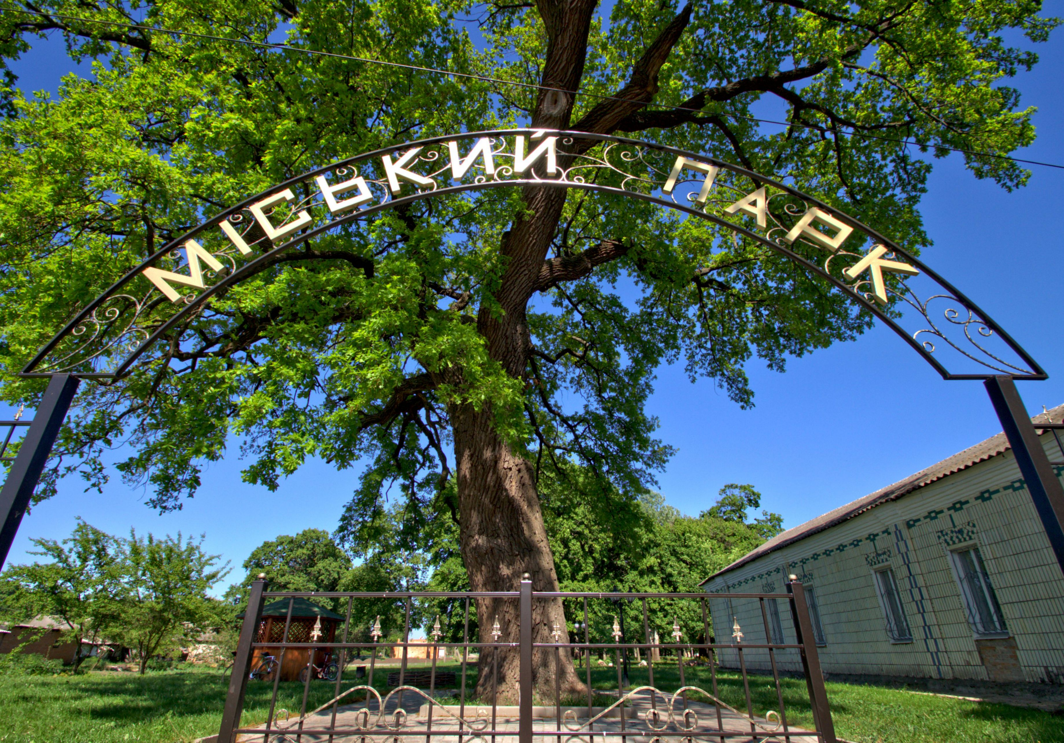 Віковий дуб